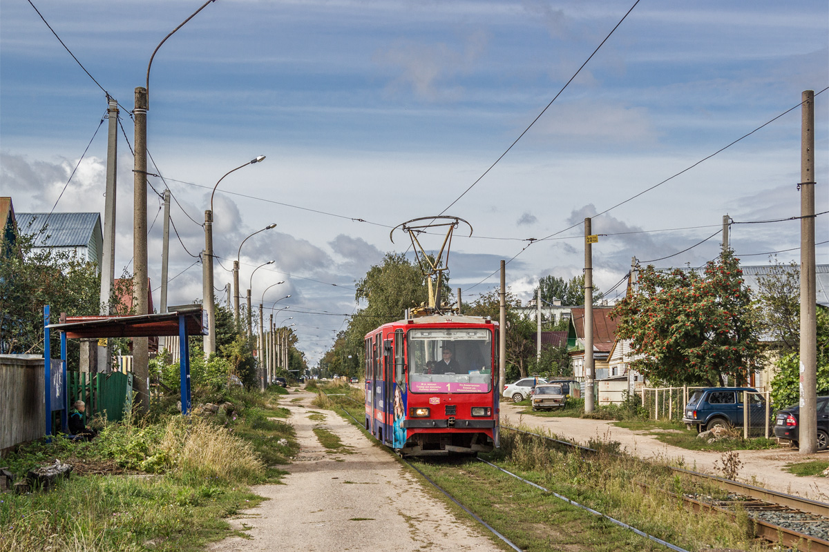 Трамвай Спектр 71-402 № 1234 в Казани